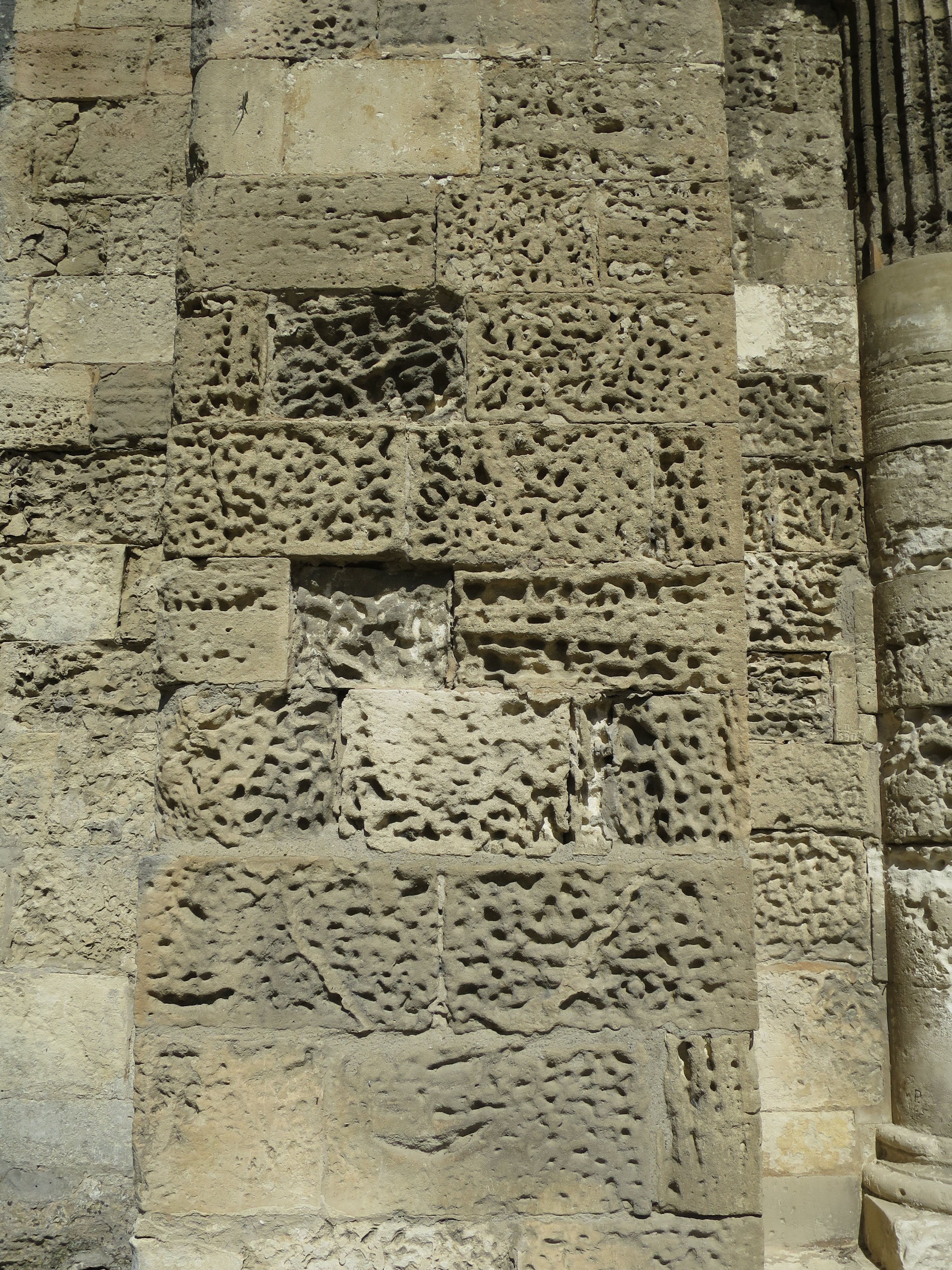 "Steinfraß" an der Kapelle Saint-Gabriel, Tarascon